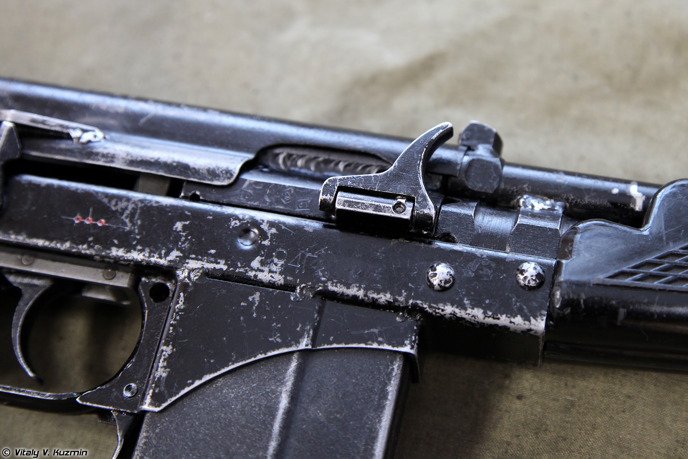 9A-91 compact assault rifle